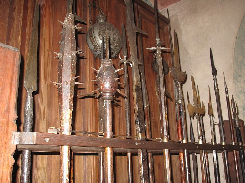 Haut Koenigsbourg